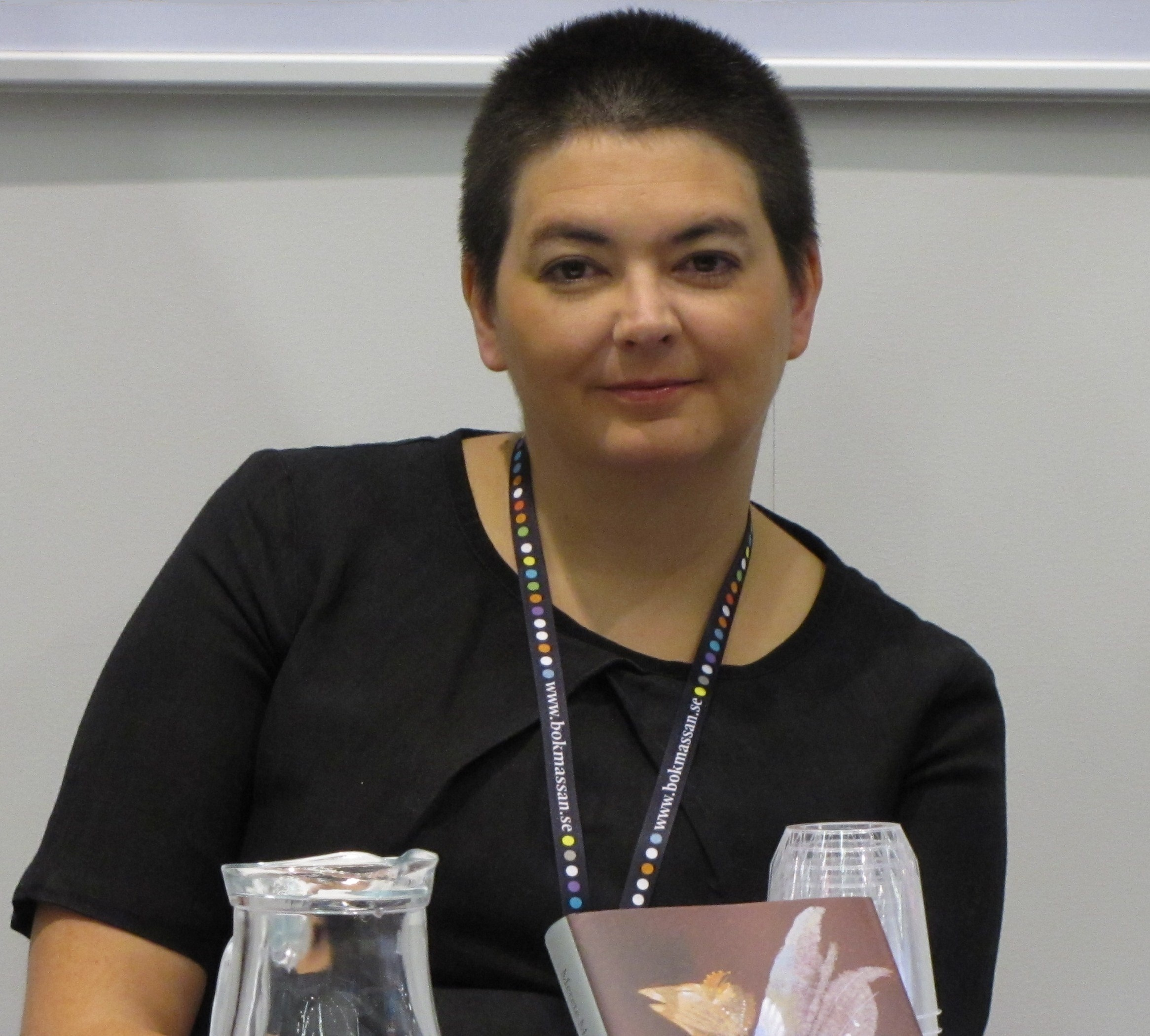 Katarina Gäddnäs på Bokmässan i Göteborg 2010.